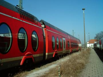 ein Bild des 618 Lirex in Magdeburg.